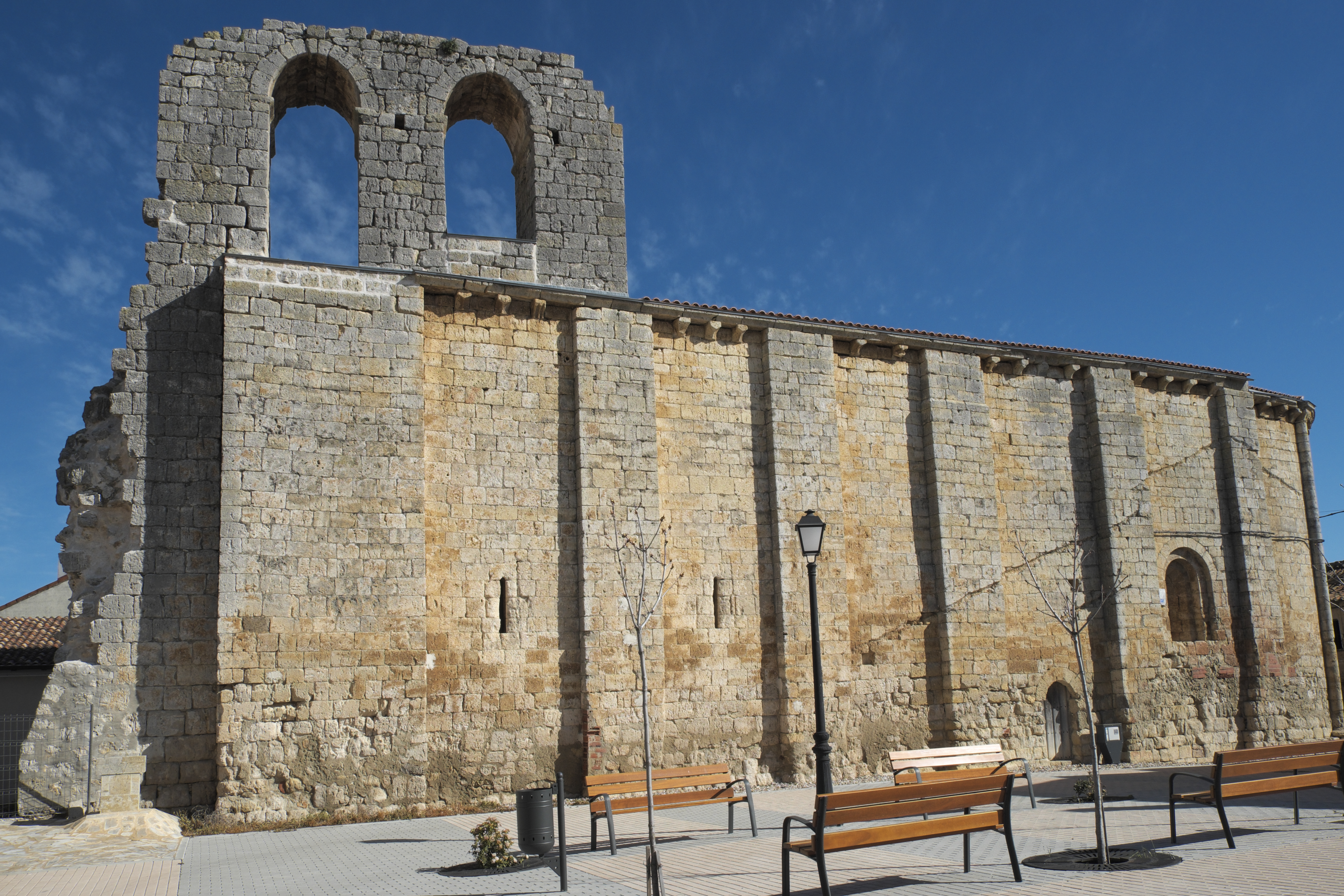 Ehemalige Templerkirche Santa María del Templo in Villalba de los Alcores in der Provinz Valladolid (Kastilien-León/Spanien)